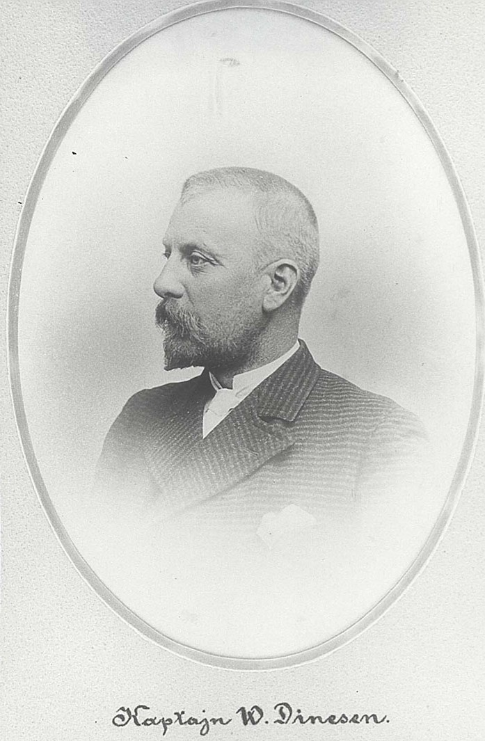 Wilhelm Dinesen fotograferad för Hørsholm Sogneråd. Fotograf Johan Crone.